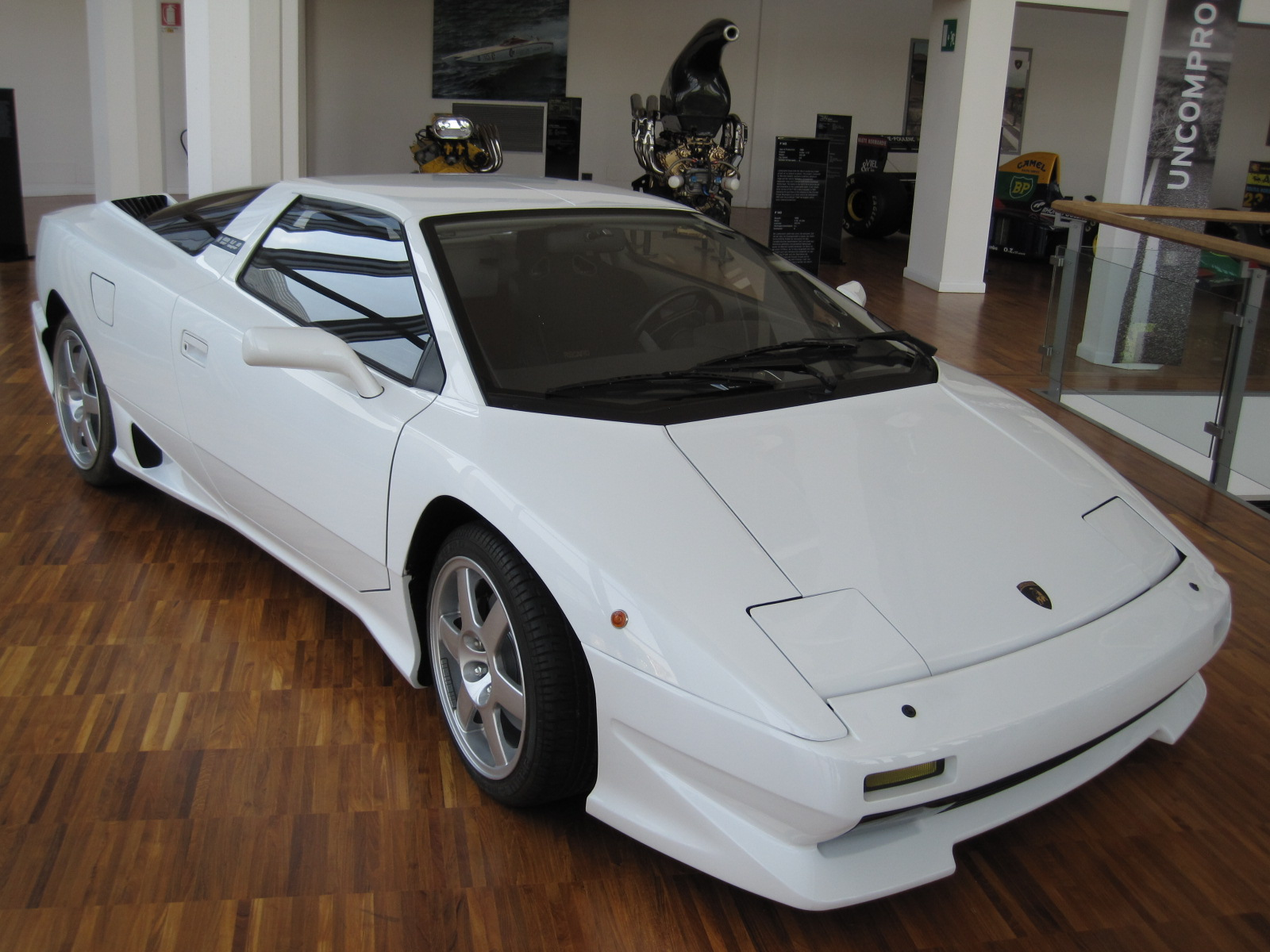 Musée Lamborghini - Prototype P 140 - V10 - 1988